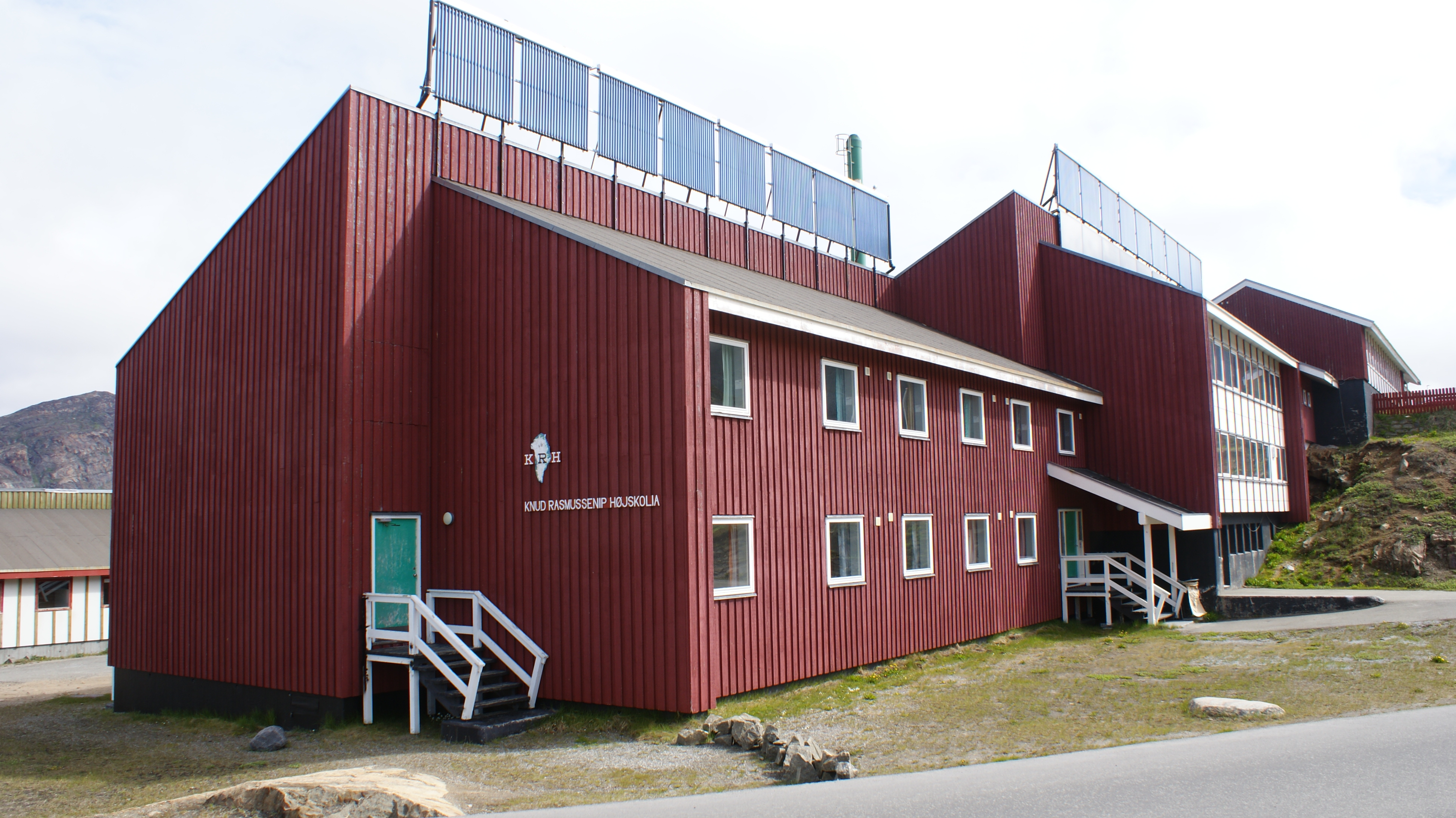 Knud Rasmussen High School (Knud Rasmussenip Højskolia) in Sisimiut, Greenland.